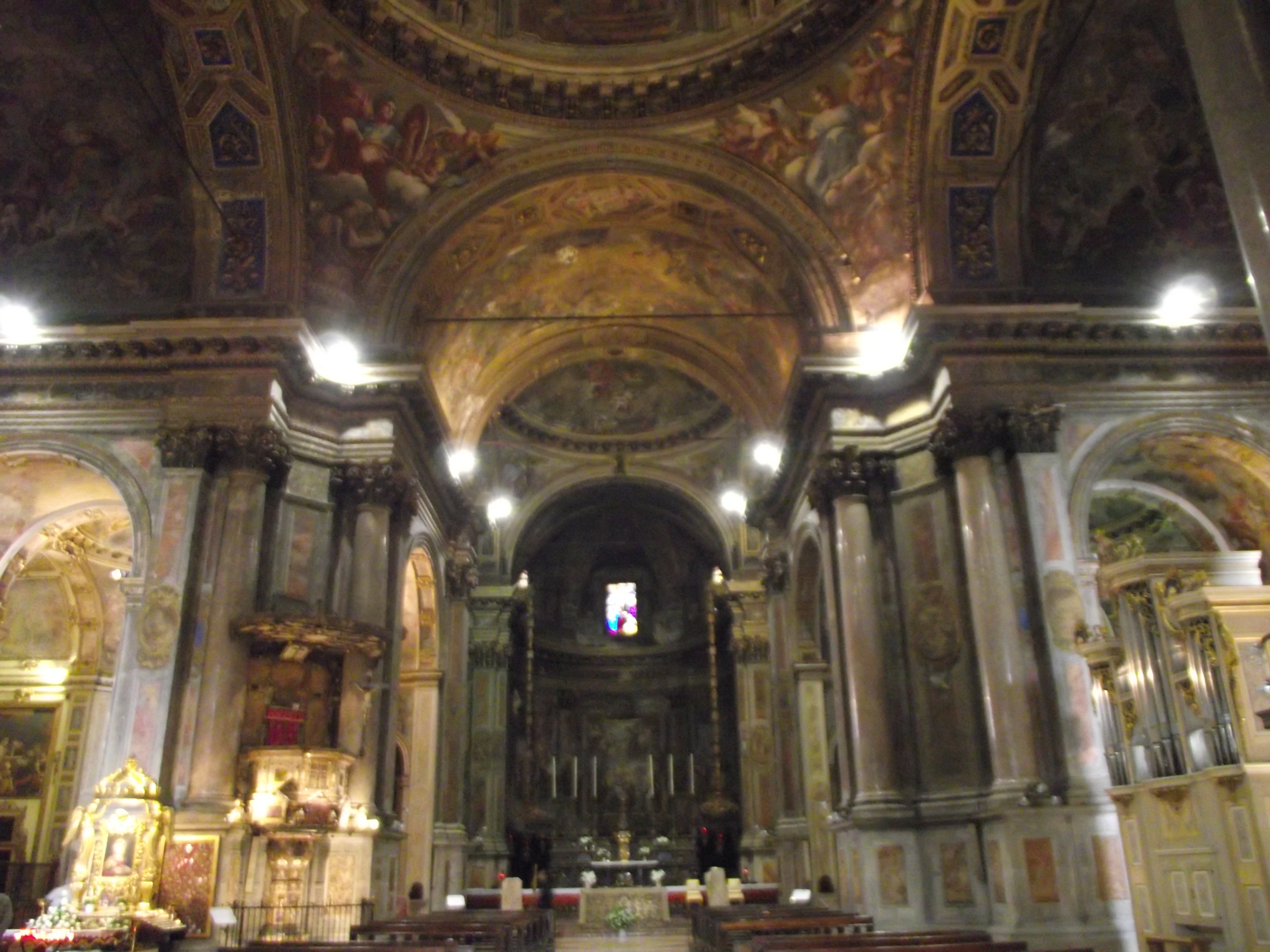 Veduta dell'interno